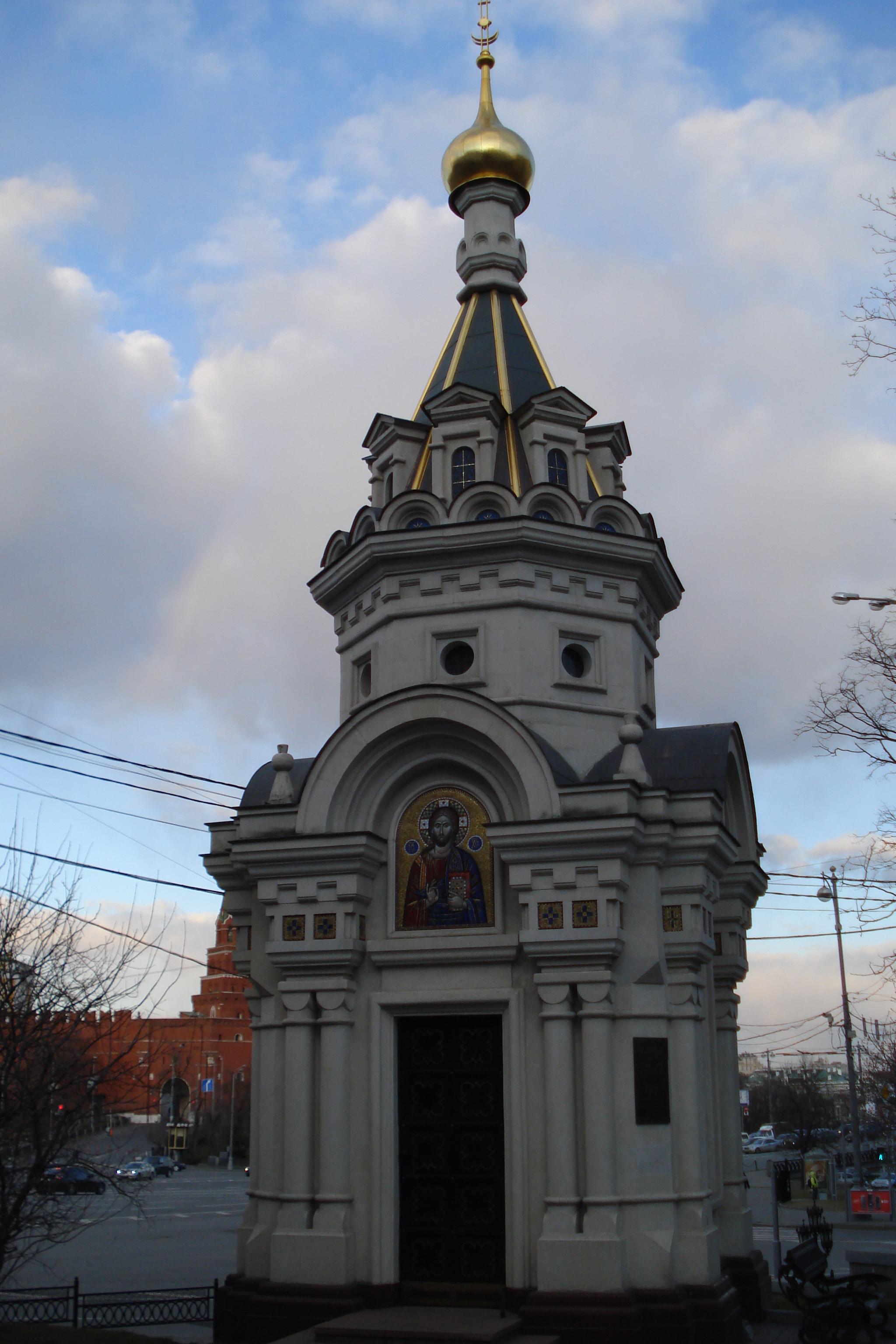 Chapel of the St Nicholas on the corner of Znamenka and Volkhonka streets in Moscow. Часовня Николая Чудотворца Можайского. Сооружена в 2006 г. на месте разрушенной в 1932 г. церкви Николы Стрелецкого на Знаменке.